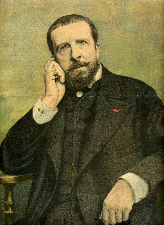 Paul Déroulède, portrait en "une" du supplément illustré du Petit Journal, numéro 259, dimanche 3 novembre 1895.